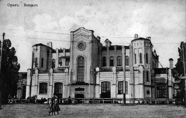 Орловский вокзал (1868 - 1943)